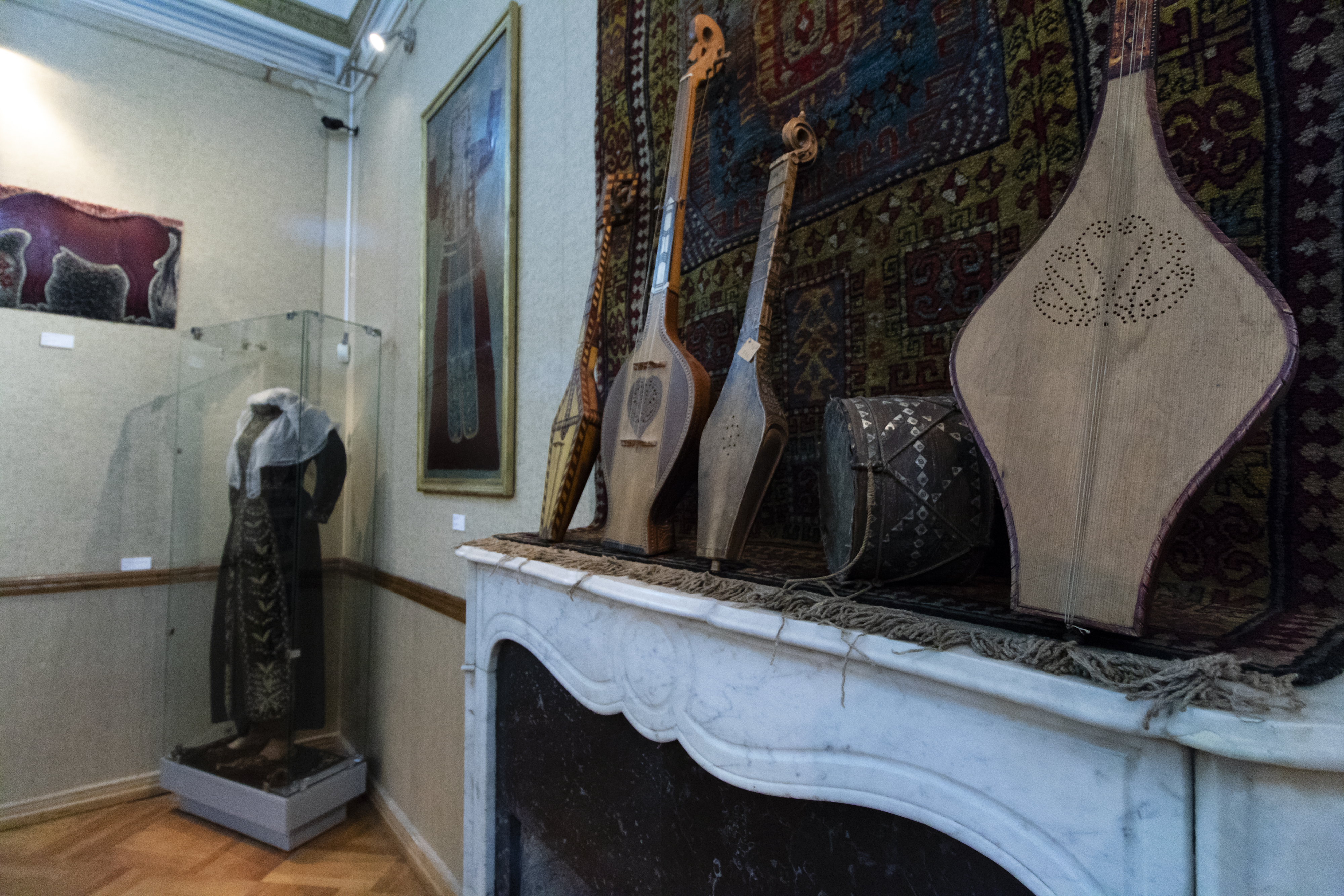 საქართველოს სახელმწიფო მუზეუმი